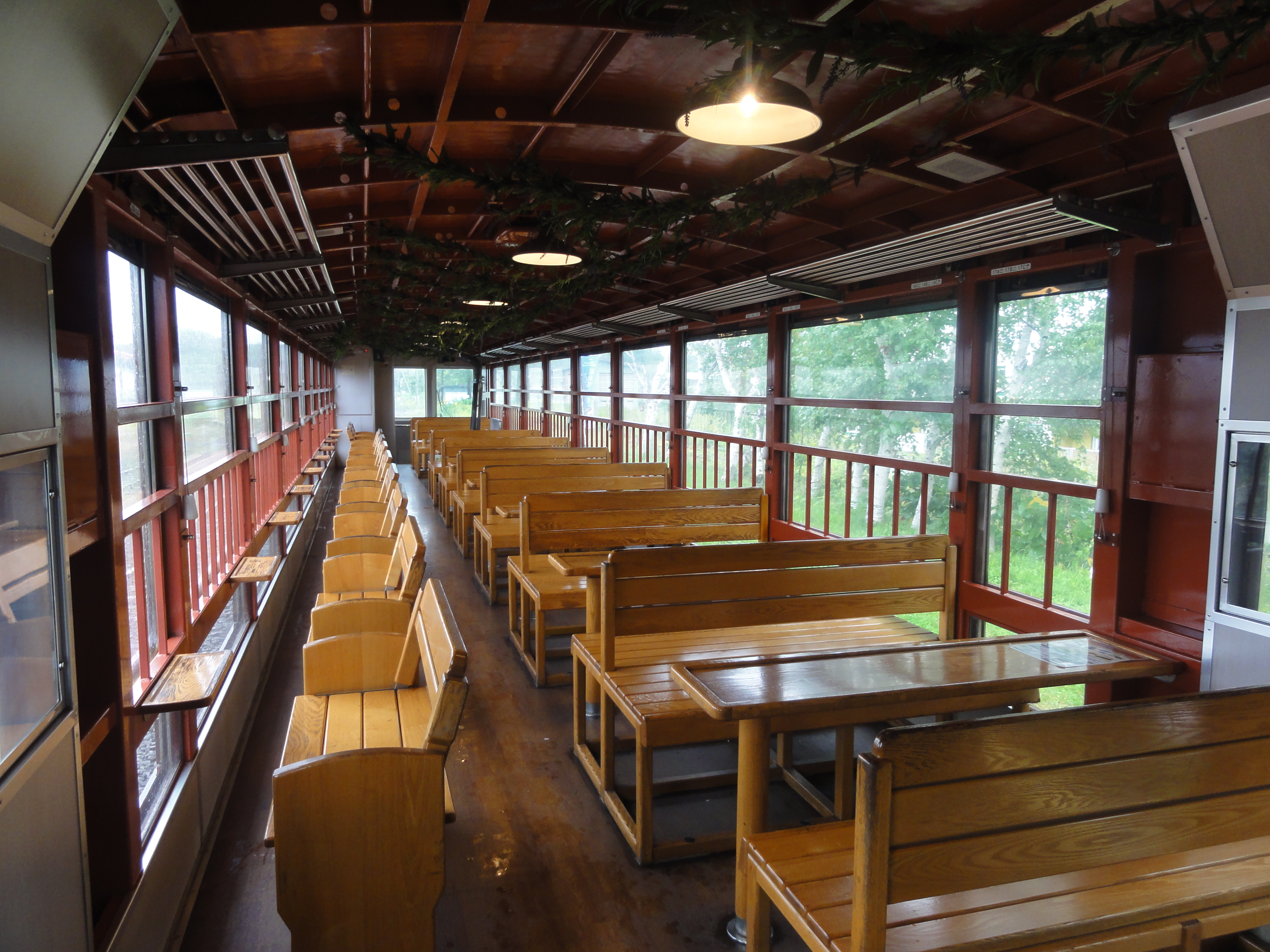 オクハテ510-2・車内